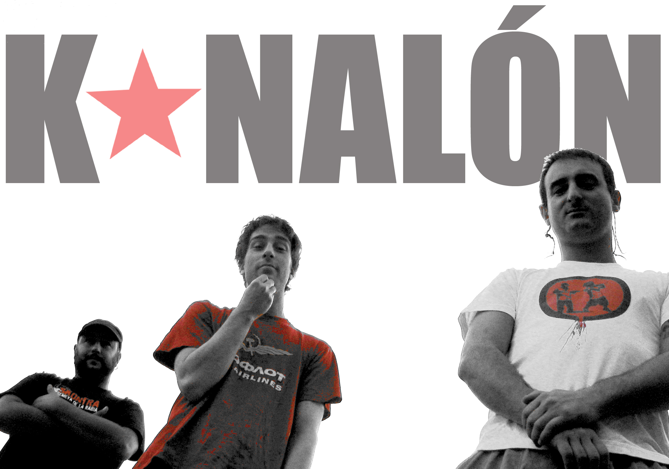 k-Nalon